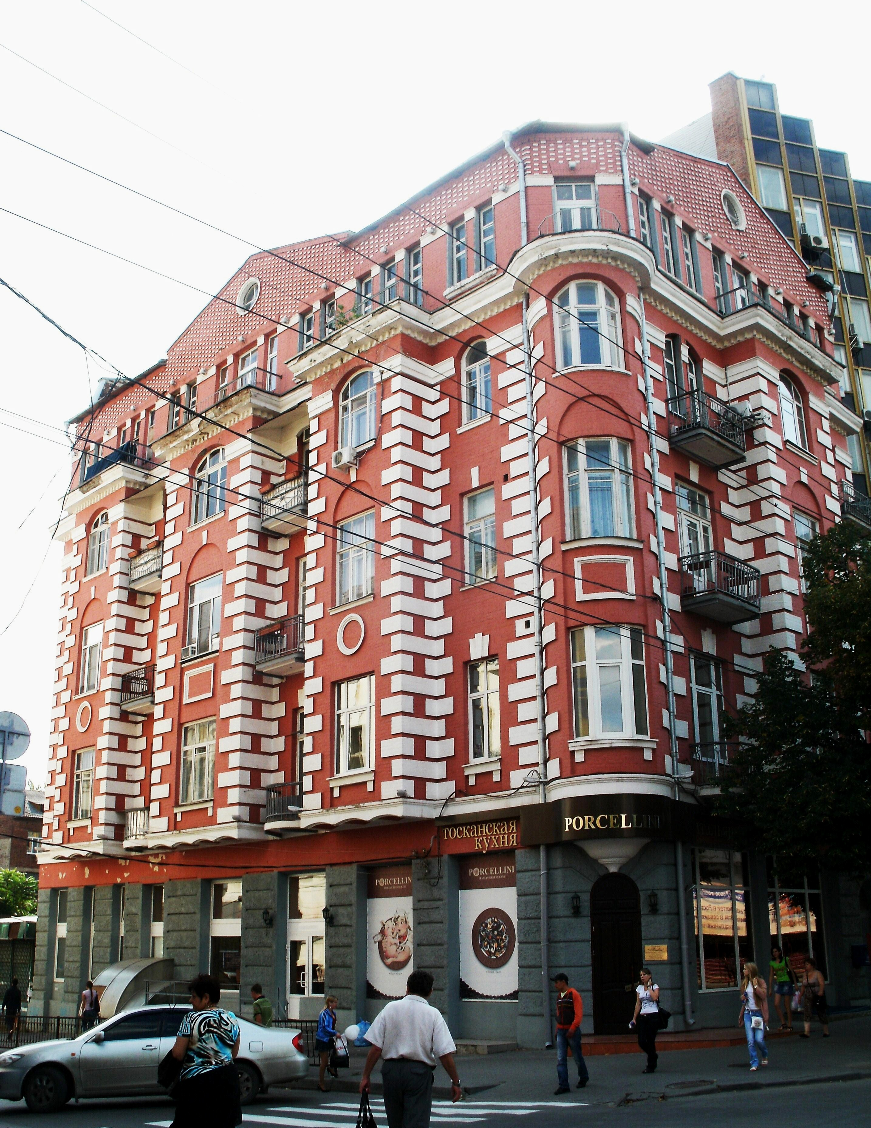 улица Большая Садовая